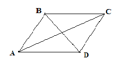 Наслідок теореми косинусів